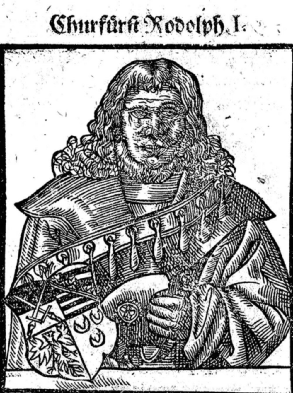 Rudolf I. von Sachsen-Wittenberg, Holzschnitt aus dem 16. Jahrhundert